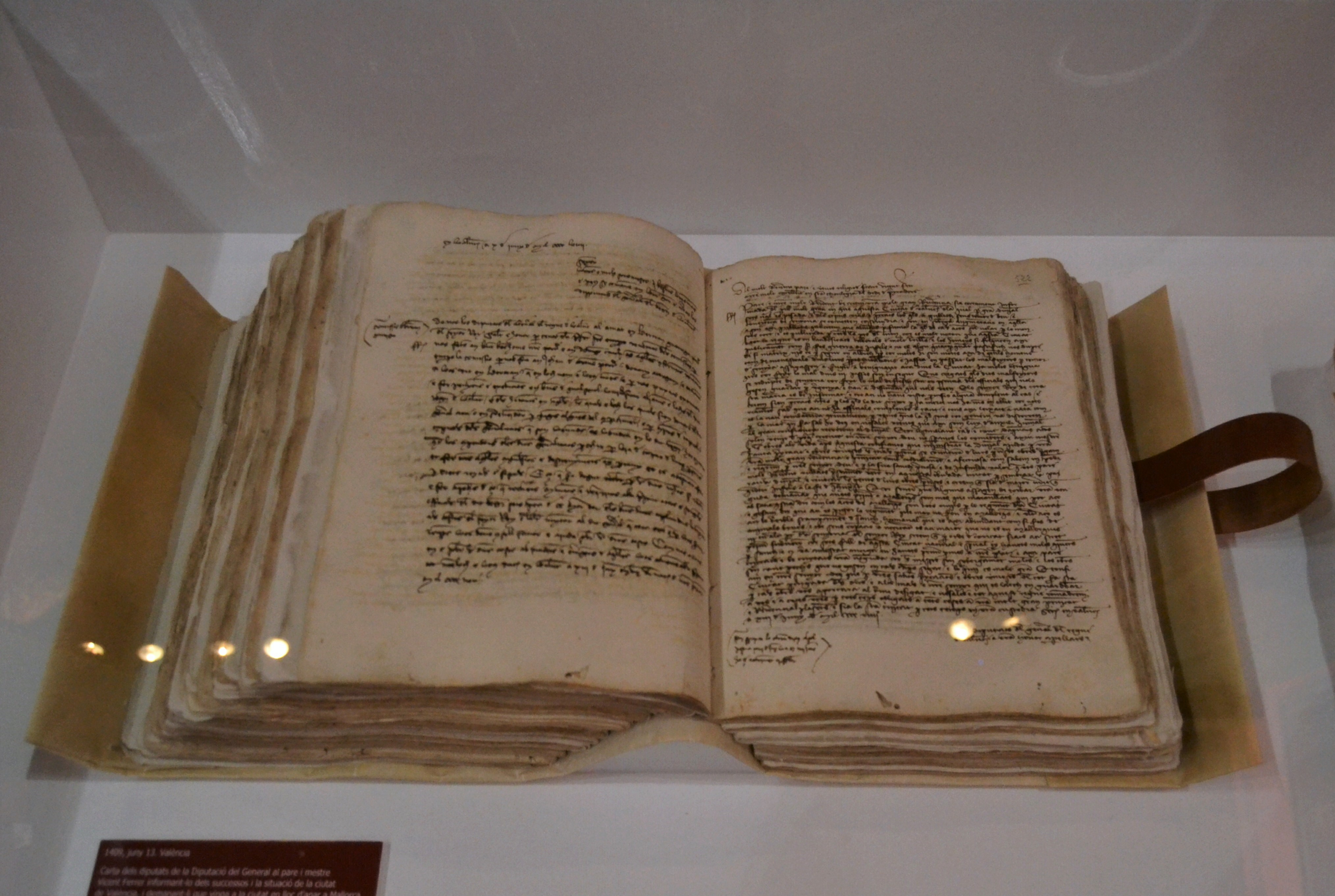 Carta dels diputats de la Diputació del General al pare i mestre Vicent Ferrer informant-lo dels successos i la situació de la ciutat, i demanant-li que vinga a la ciutat enlloc d'anar a Mallorca. 13 de juny de 1409, València. Arxiu del Regne de València, Generalitat, llibre 4930 bis, fol. 522. Fotografia feta durant l'exposició La memòria del Regne, 600 anys de la Generalitat Valenciana.